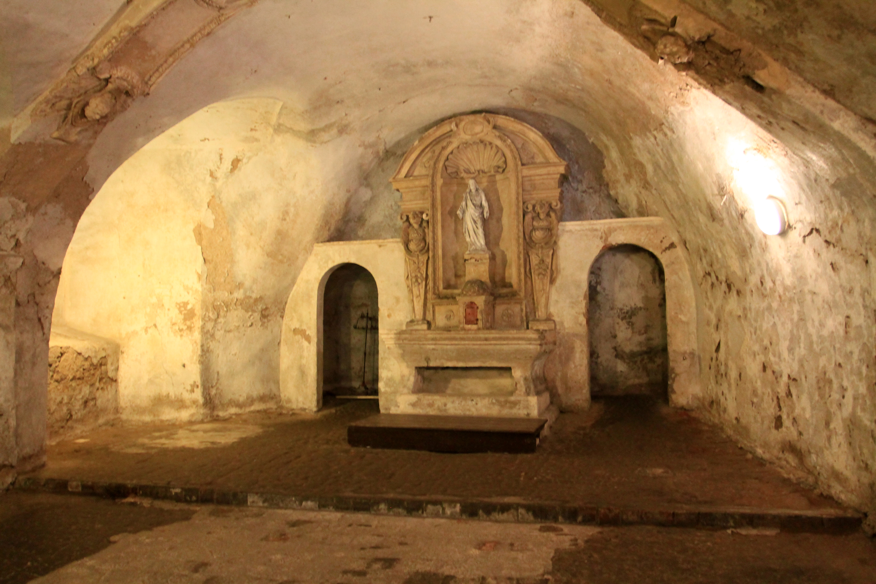 Jeskyně svatého Ivana, Svatý Jan pod Skalou.